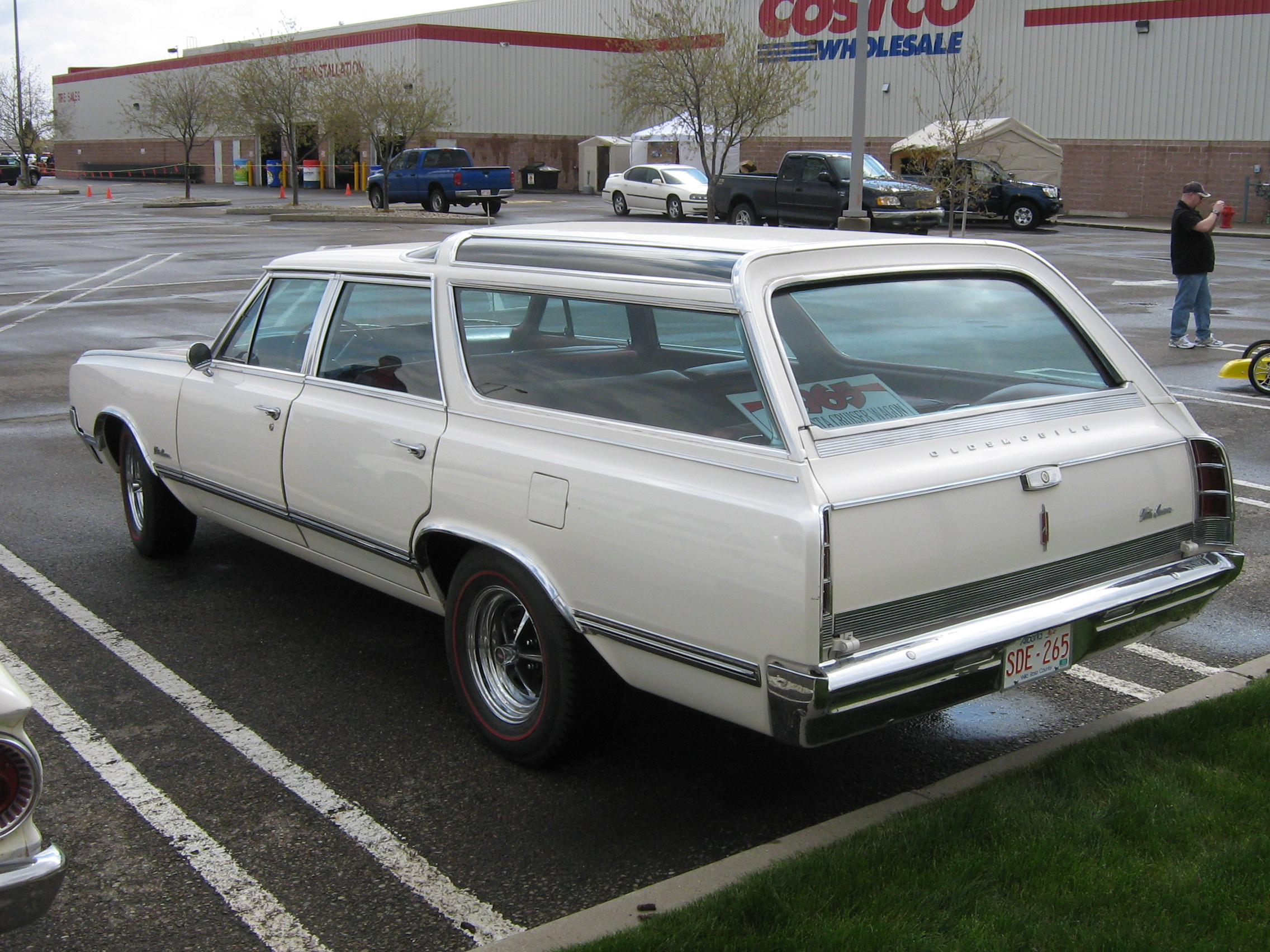 1965 Oldsmobile Vista Cruiser